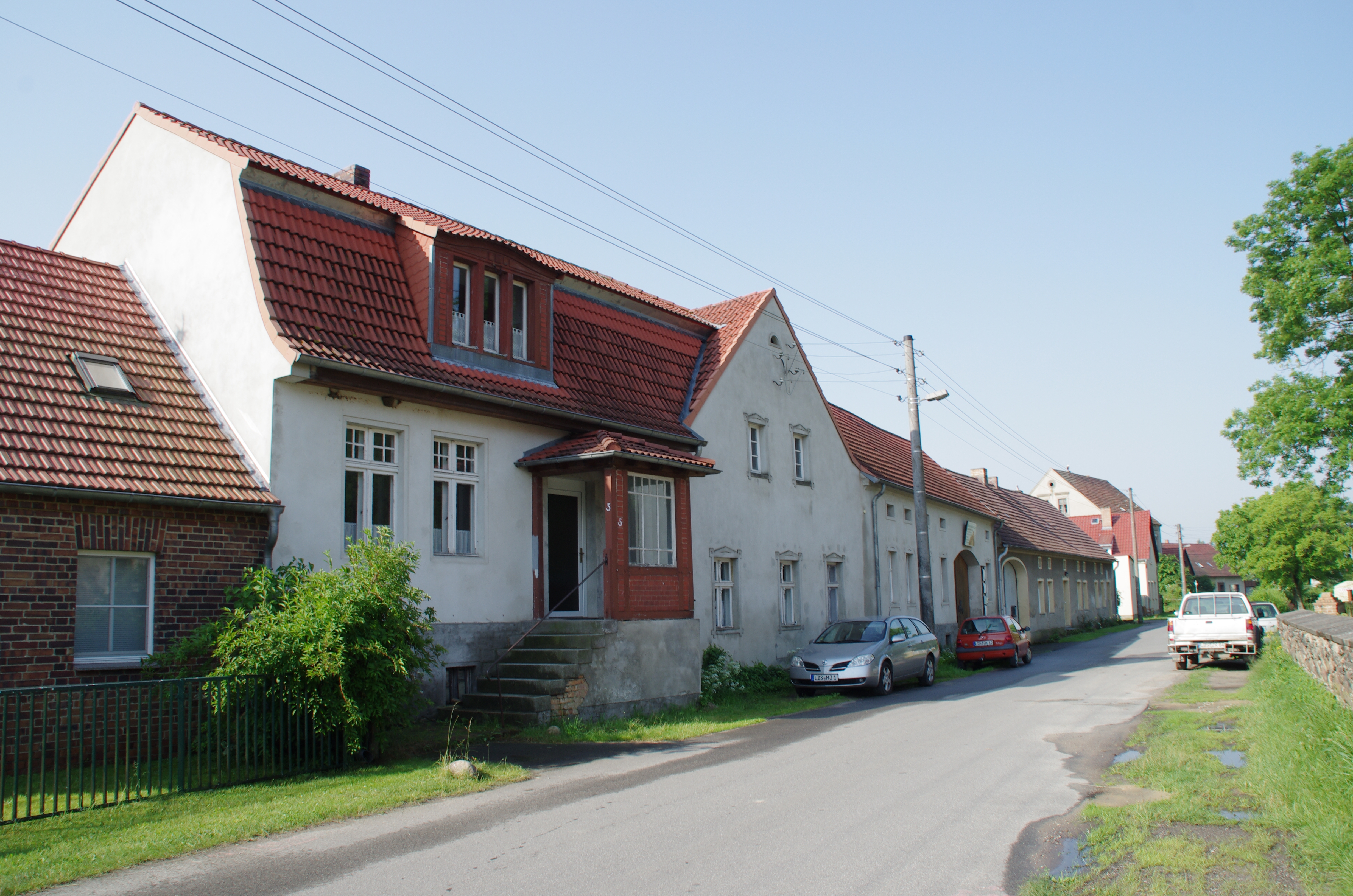 Luckau in Brandenburg, Ortsteil Zöllmersdorf. Das Haus in der Zöllmersdorfer Dorfstraße 5 steht unter Denkmalschutz.